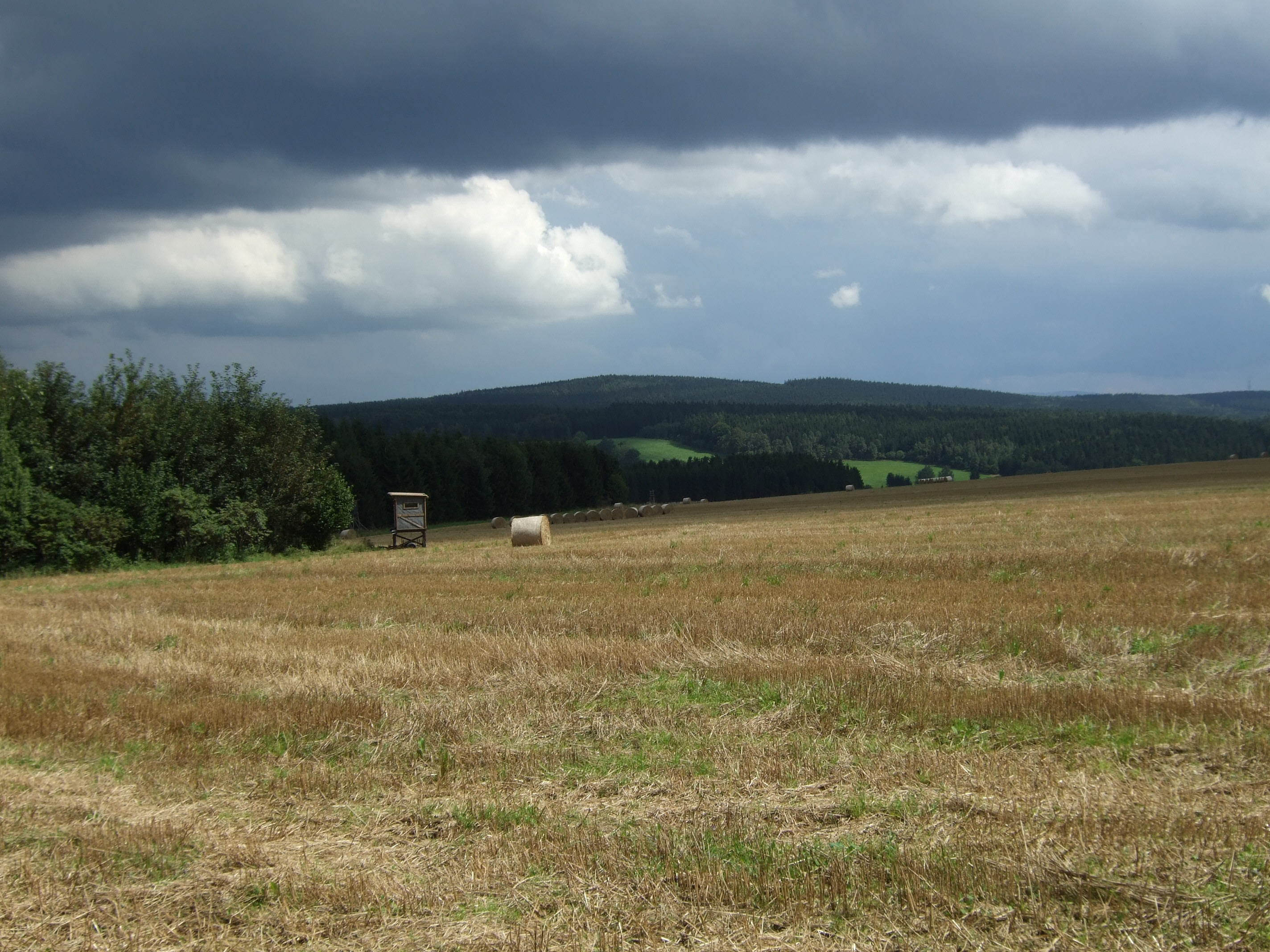 Blick auf den Schatzenstein aus Richtung Grünhain bei Gewitterstimmung